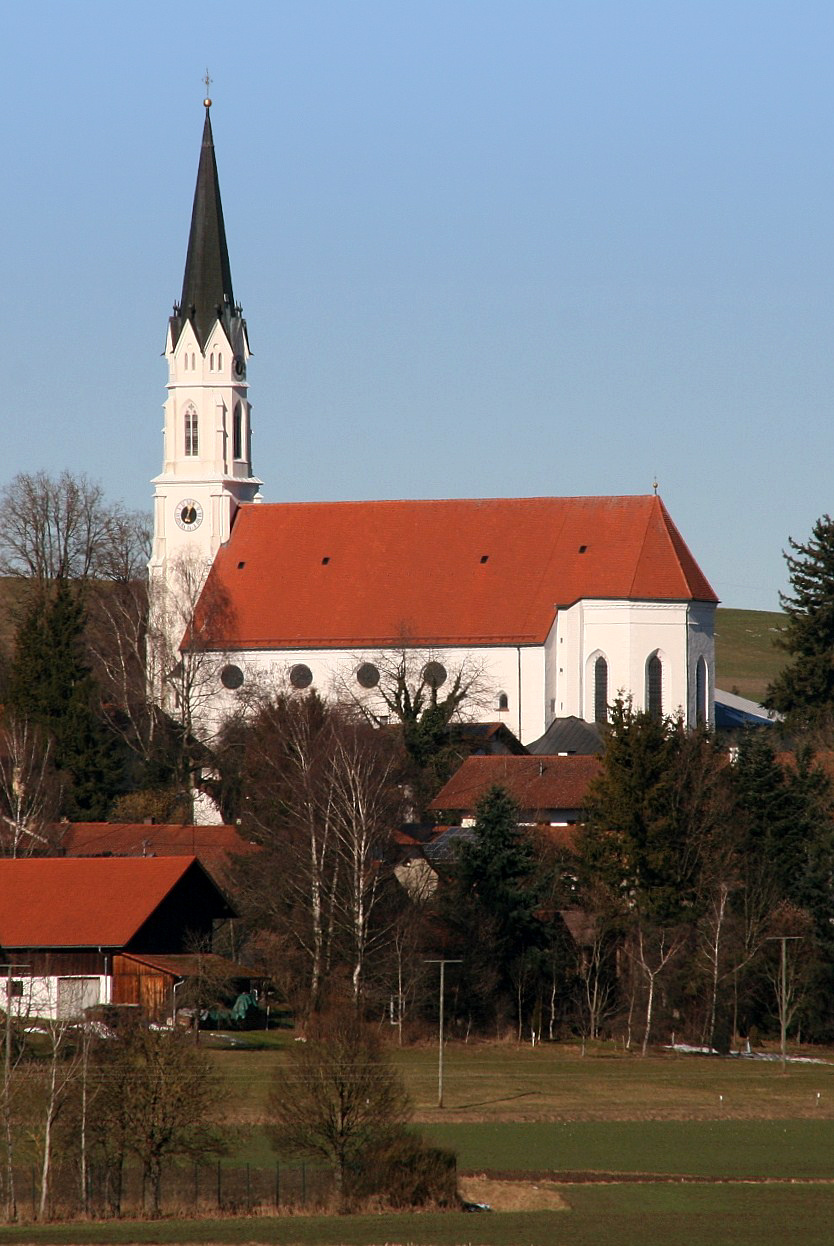 Mariä Himmelfahrt die katholische Pfarrkirche von Kirchdorf (Landkreis Mühldorf am Inn, Oberbayern). Aus dem um 1200 errichteten romanischen Bau wurde um 1472 ein spätgotischer, welcher ab 1690 barockisiert und im späten 19. Jahrhundert neugotisch umgestaltet wurde. Der Innenraum steht vor allem unter barockem Einfluss.